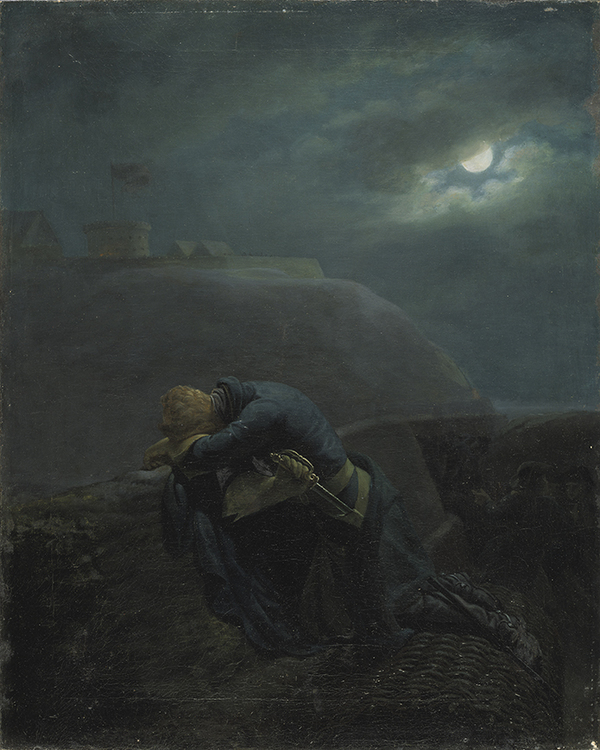 Desenho do séc.XVIII que serviu de ilustração a uma das edições do livro "Histoire de Charles XII", de Voltaire.